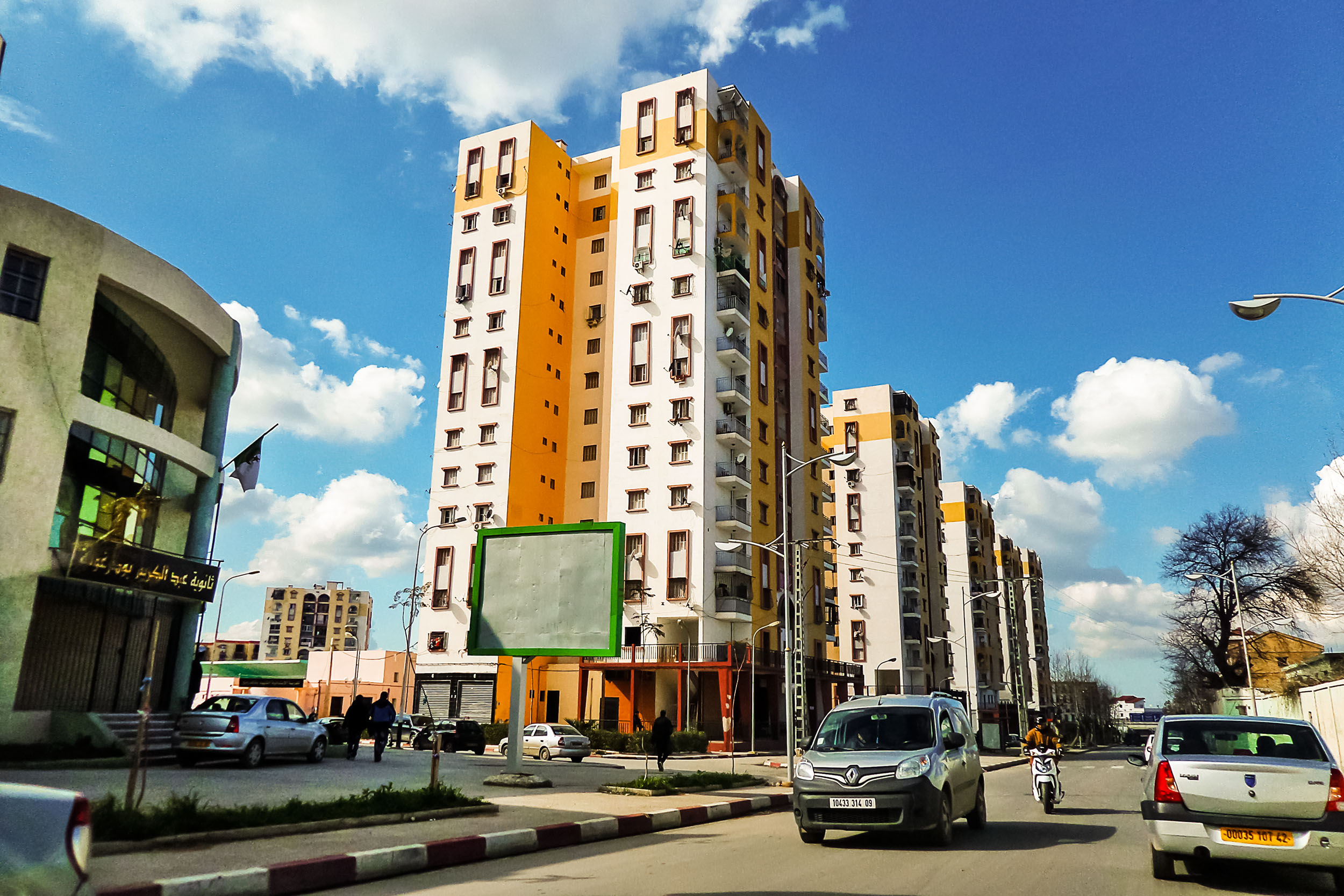 Brakni براكني